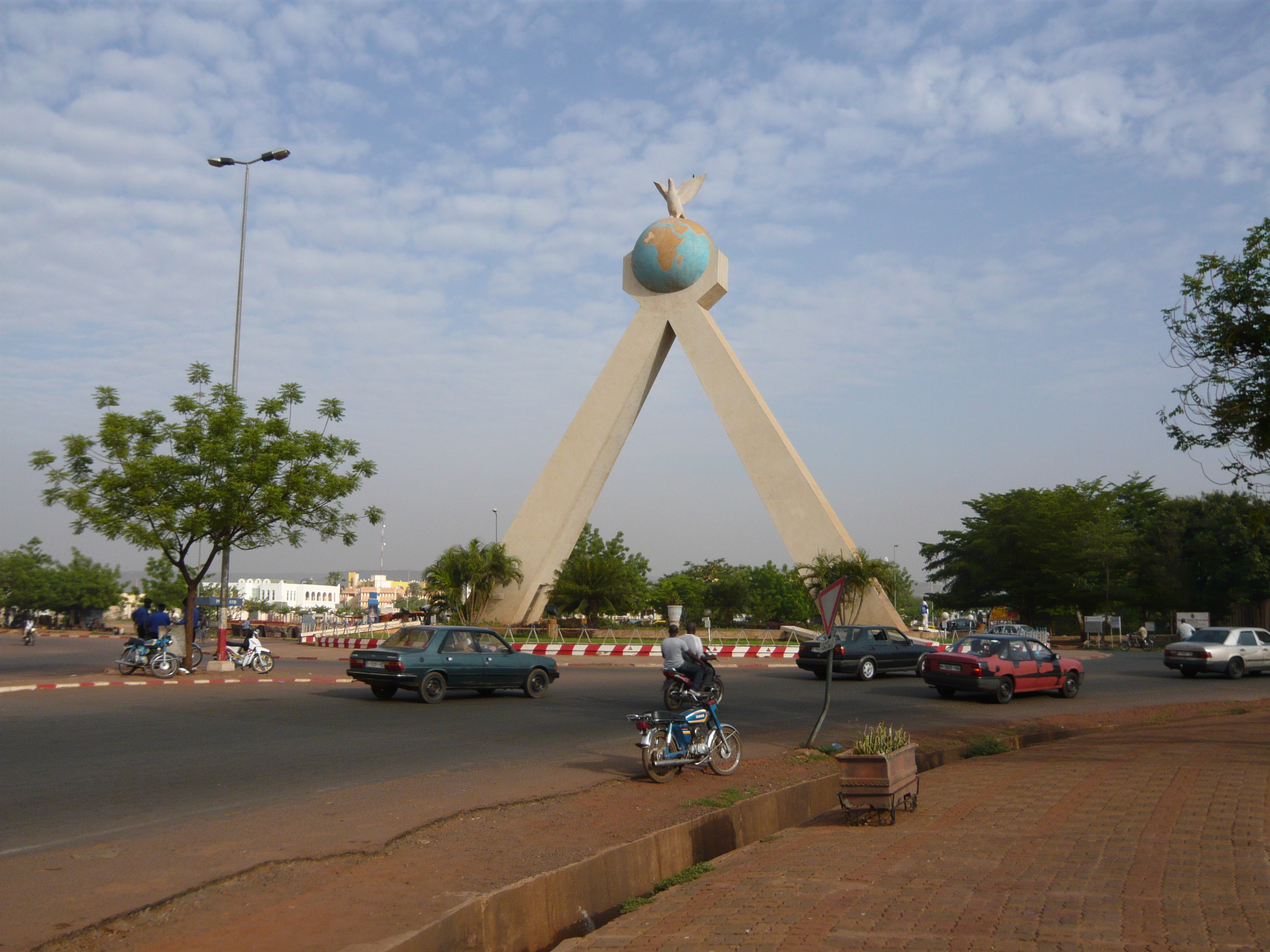 Monument de la paix, Entrée du pont Fadh - Bamako, Mali